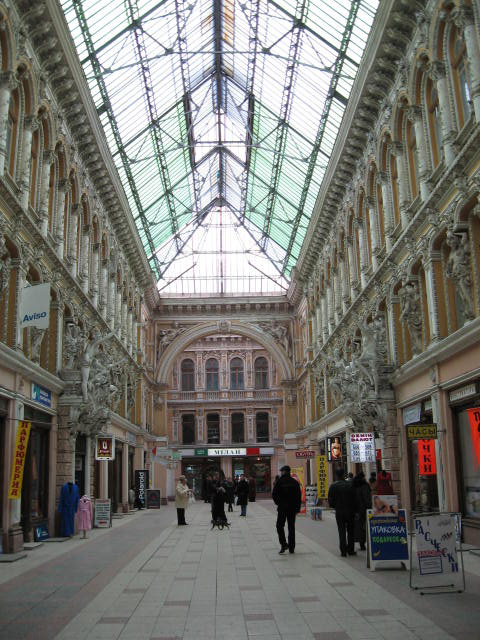 Одесский пассаж